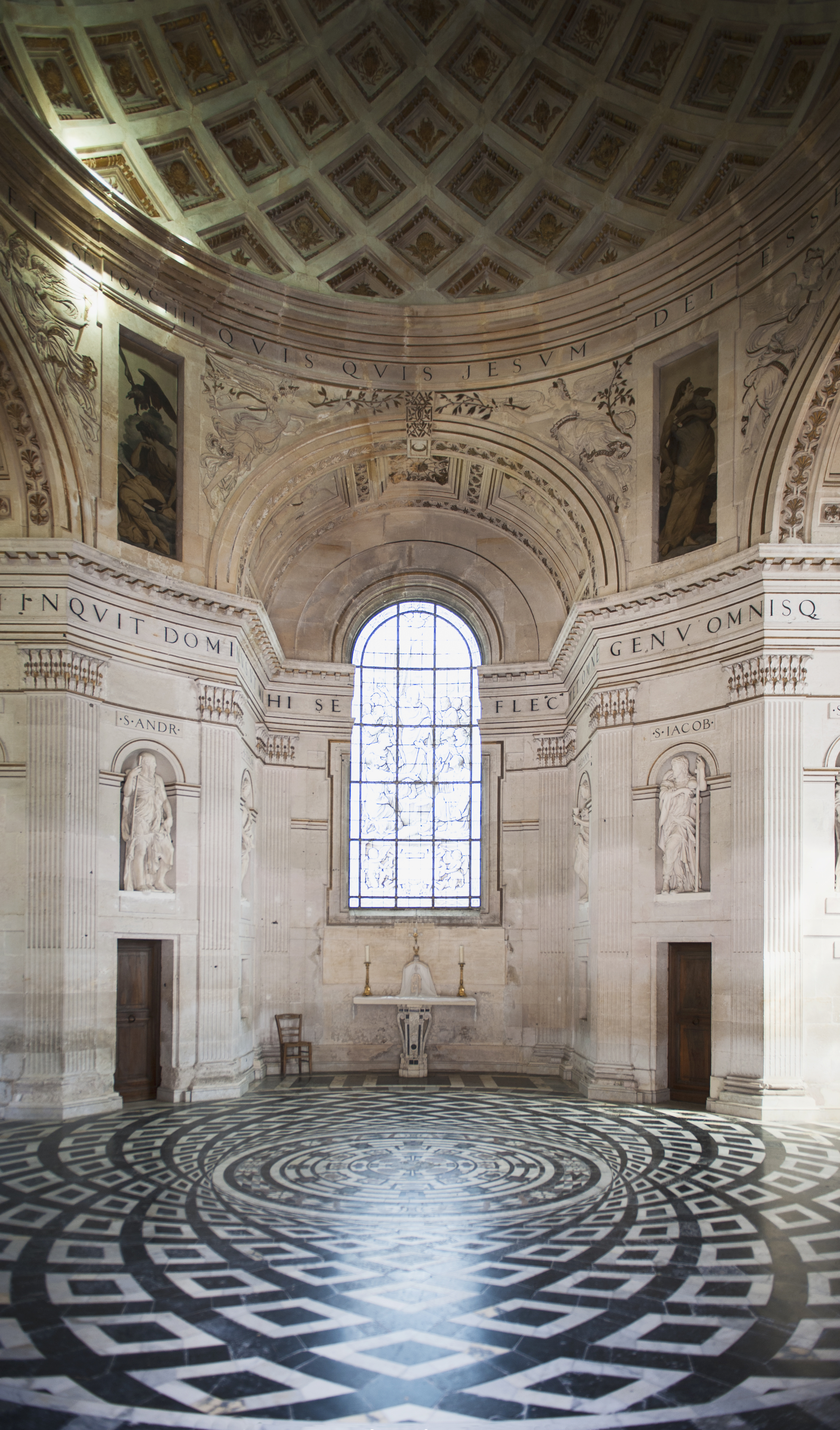 Château d'Anet (Classé)Chapelle - intérieur .